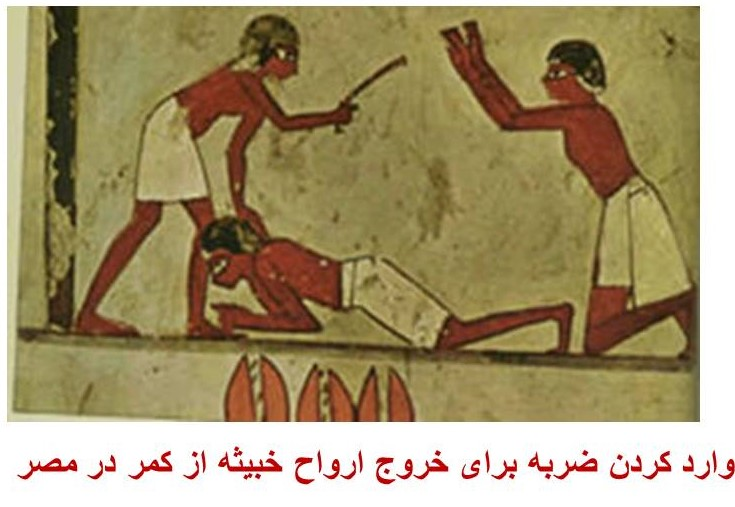 کمردرد